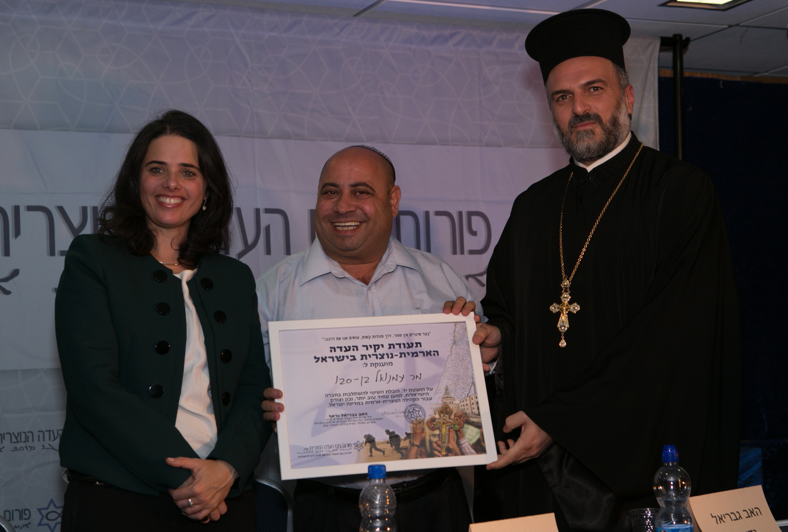 גבריאל נדאף, עמנואל בן סבו ואיילת שקד בטקס הענקת תעודת יקיר העדה הארמית-נוצרית בישראל לעמנואל בן סבו